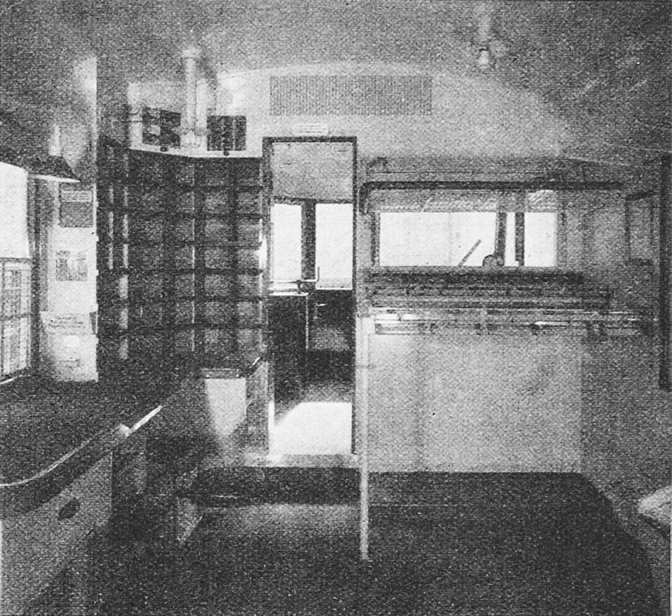 Postabteil des BLS CFZe 2/6 Nr. 681